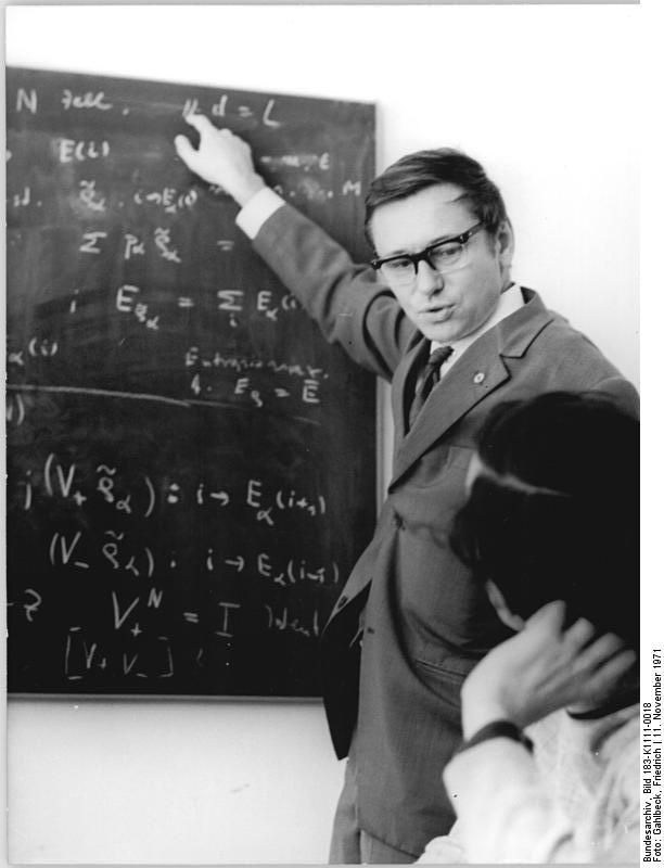 Leipzig, Universität, Physikvorlesung ADN-ZB Gahlbeck 11.11.1971 Leipzig: Prof.Dr.Uhlmann-Kandidat für die oberste Volksvertretung- Erneut für die Volkskammer kandidiert Prof.Dr.Armin Uhlmann(41), Mitglied der SED, Direktor der Sektion Physik an der Leipziger Karl-Marx-Universität. Der Abgeordnete wirkt an dieser Bildungsstätte als Hochschullehrer und Forscher auf dem Gebiet der theoretischen Hochenergiephysik. Mehrere Jahre arbeitete der Wissenschaftler iI DDR M Vereinigten Kernforschungsinstitut in Dubna(UdSSR). (dazu auch Foto K1111-19N)